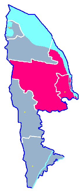 Locator maps for communes in województwo zachodniopomorskie : Police gm.png (podział na gminy)